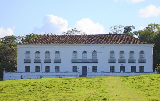 Casarão do antigo engenho moreno. Foto tirada pela prefeitura